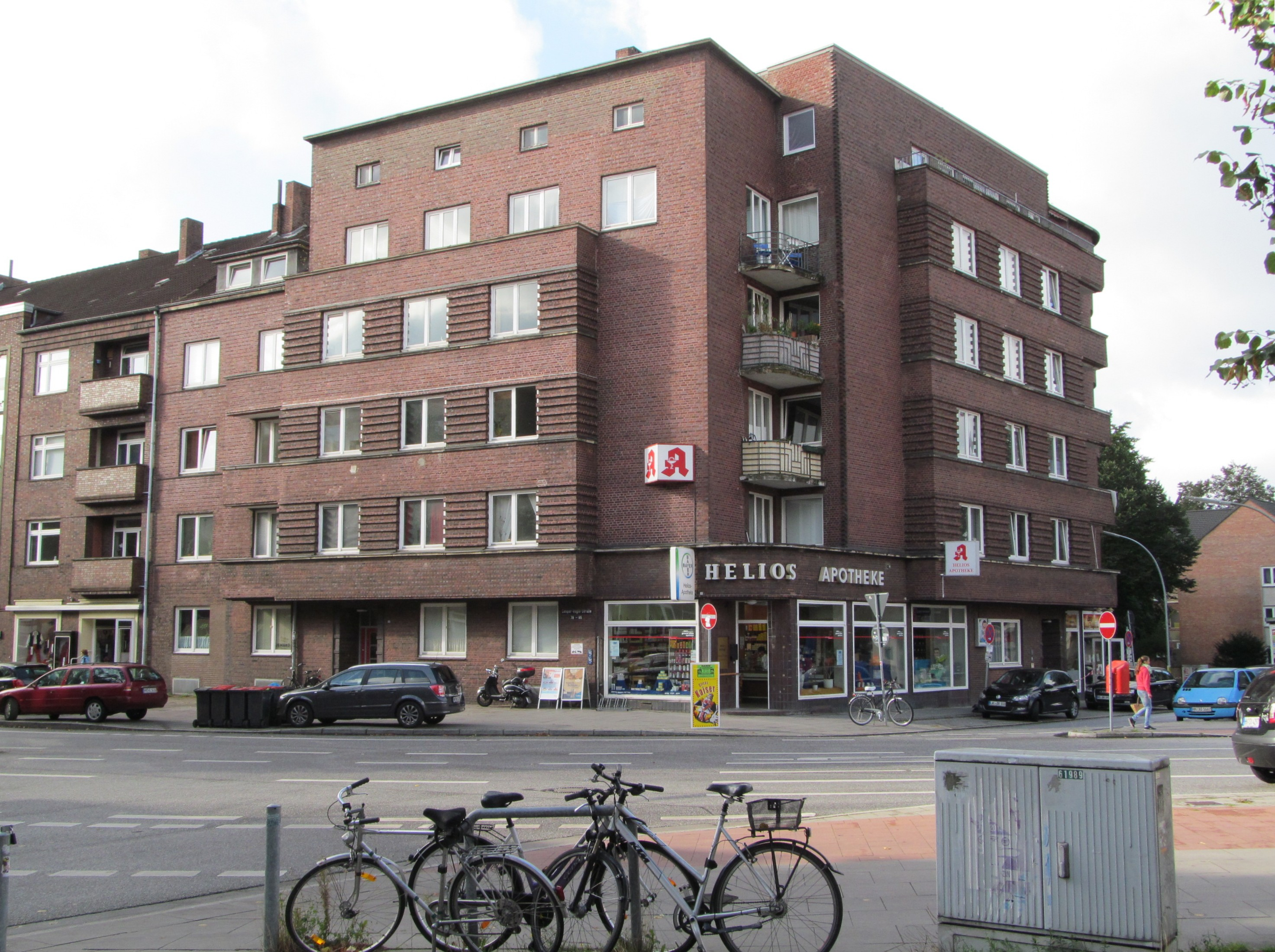 Denkmalgeschütztes Eckhaus Caspar-Voght-Str. 85 / Marienthaler Str. 148 in Hamburg-Hamm, erbaut 1928, Denkmalnummer 45416